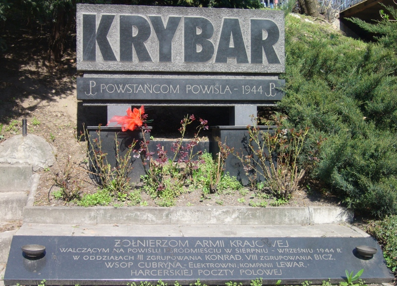 Pomnik zgrupowania AK "Krybar" na warszawskim Powiślu (ul. Tamka)